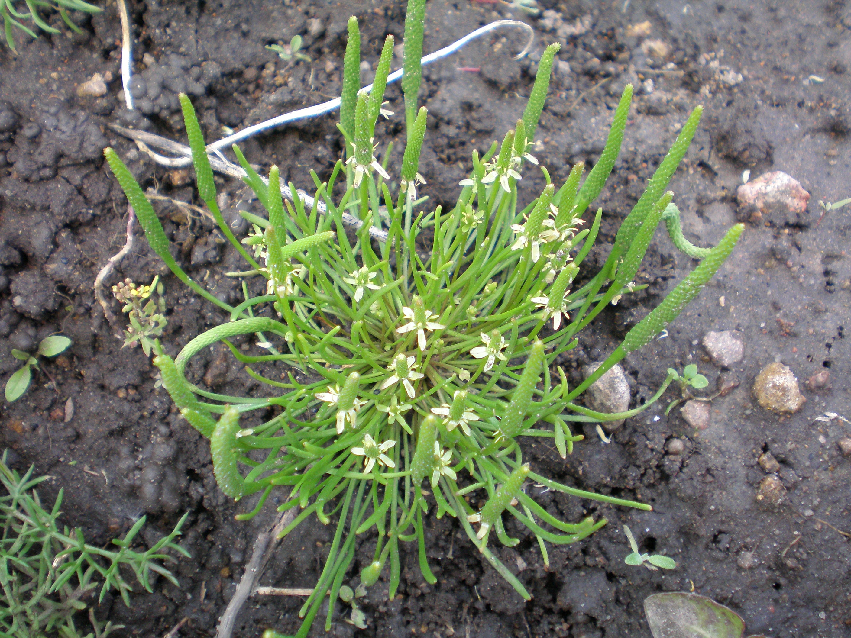 Myosurus minimus